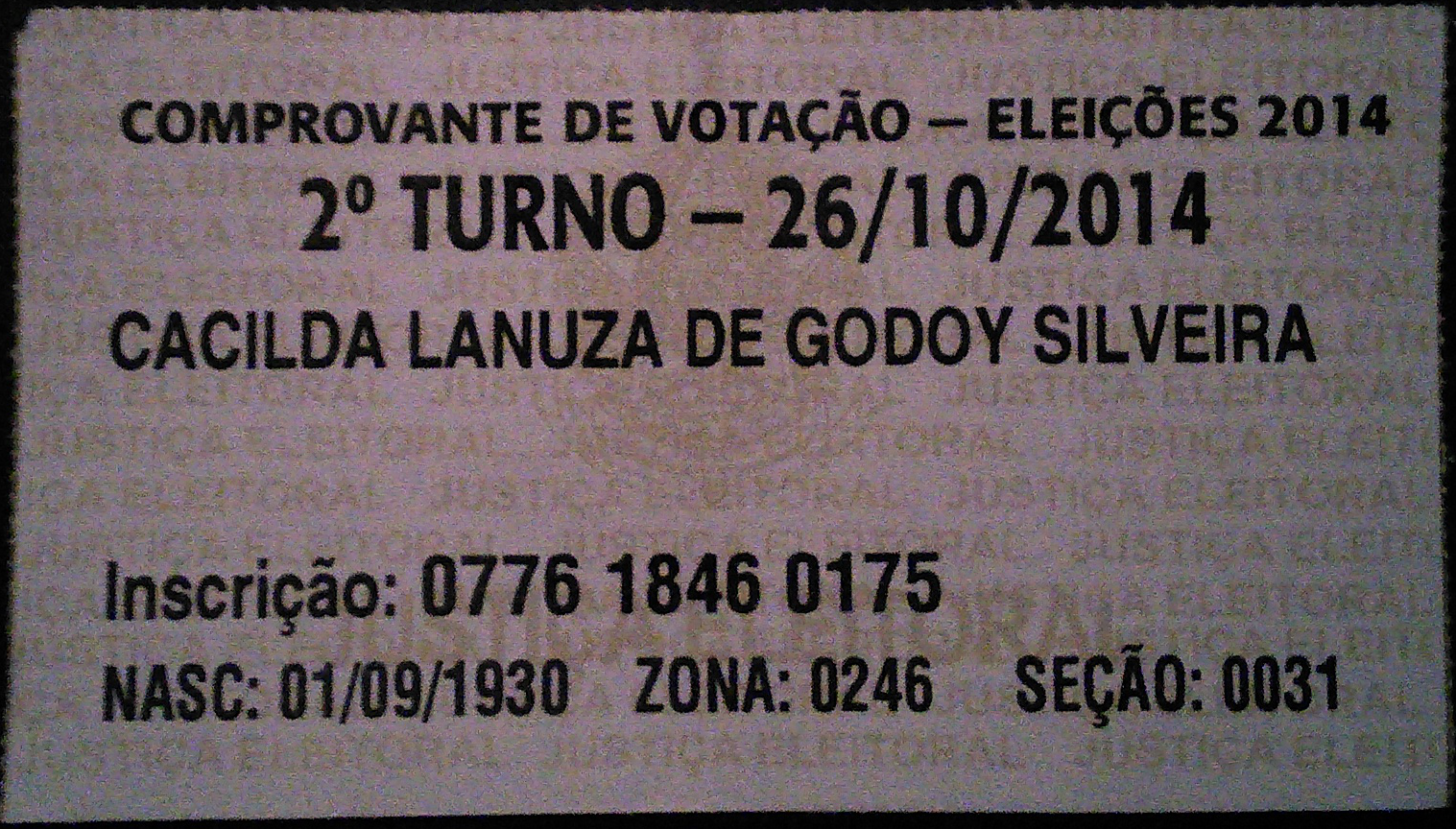 Fotografia de um comprovante de votação da atriz brasileira Cacilda Lanuza de Godoy Silveira, mostrando sua real data de nasciment.